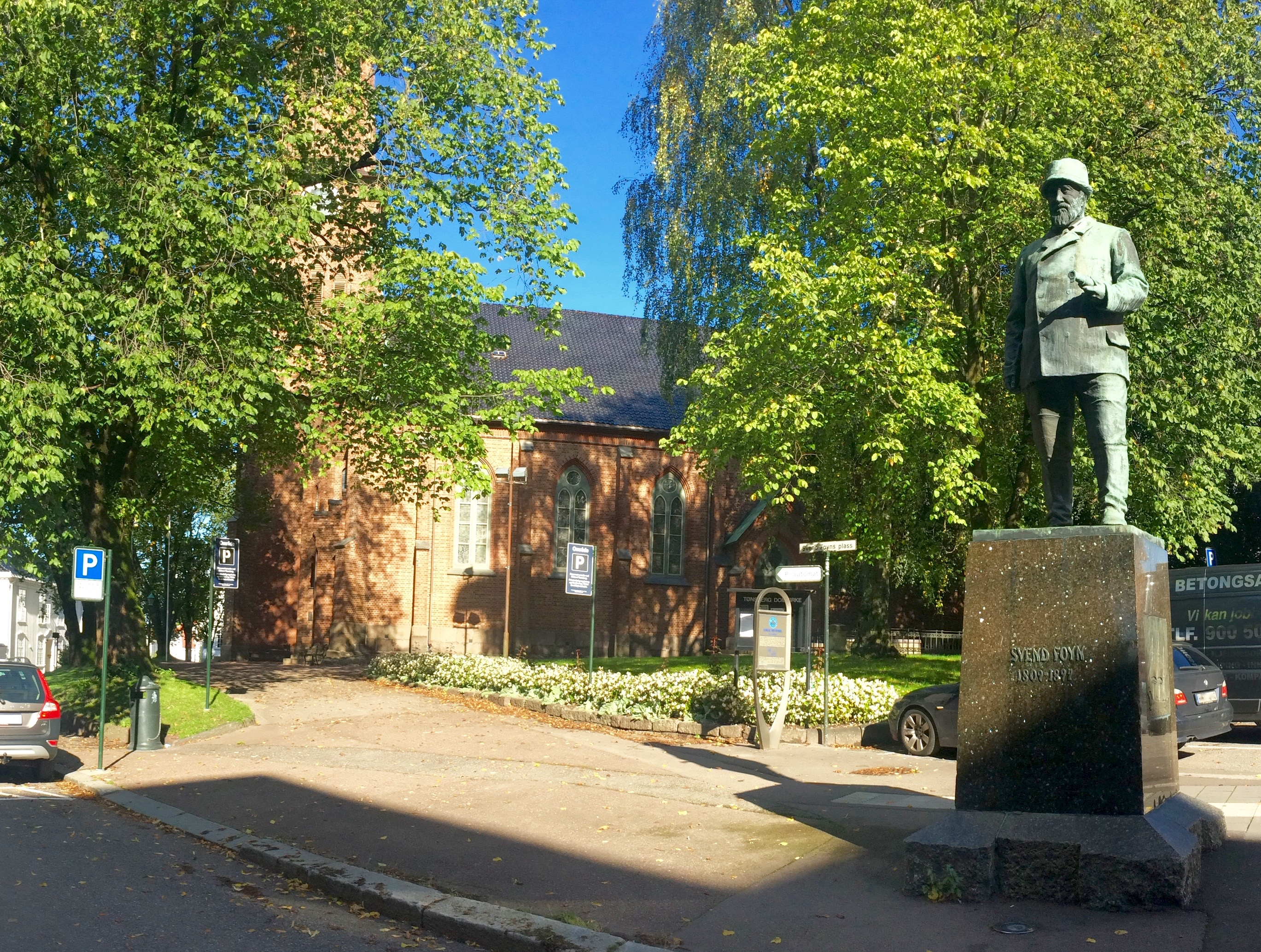 Statue av Svend Foyn (1809–1894), grunnleggeren av den moderne hvalfangsten, på Svend Foyns plass ved Tønsberg domkirke i Tønsberg i Vestfold. «Skiænket Tønsberg By av Hvalfangere 1915». Beskåret, fortegnet panoramabilde 25. september 2015.